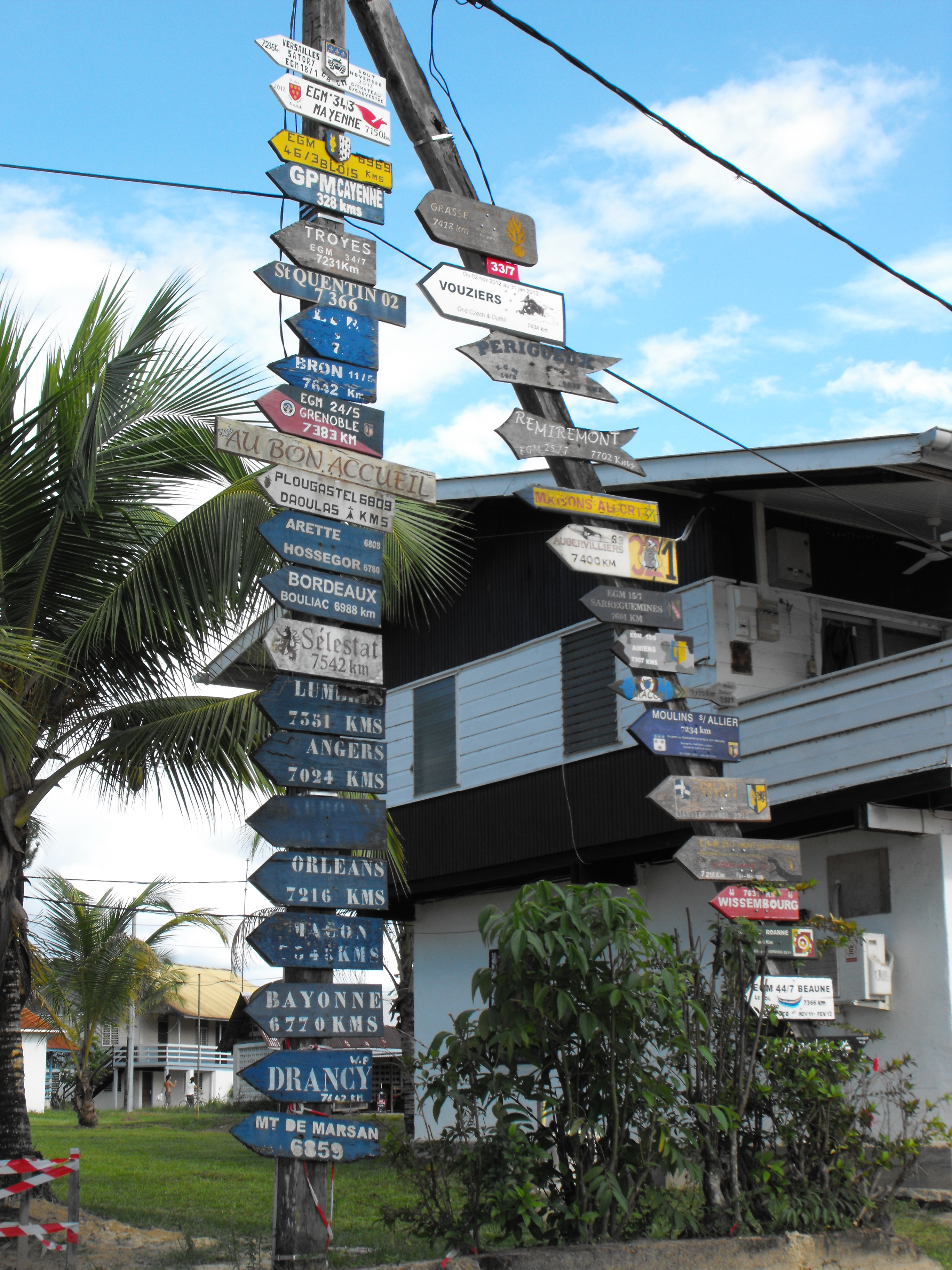 Souvenirs laissés par les gendarmes mobiles en renfort à Grand Santi ( février 2013 )